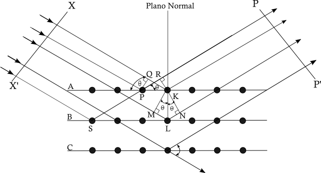 ley de bragg